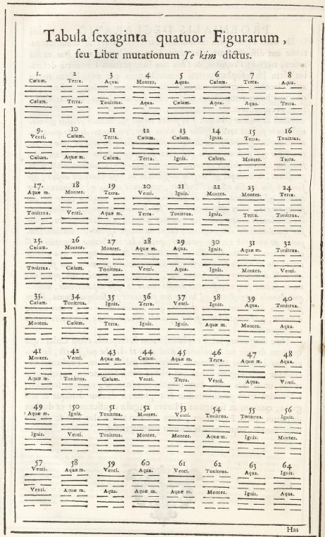 Hexagrammata Libri mutationum a Philippo Couplet depicta: Confucius sinarum philosophus (1687) p. xliv